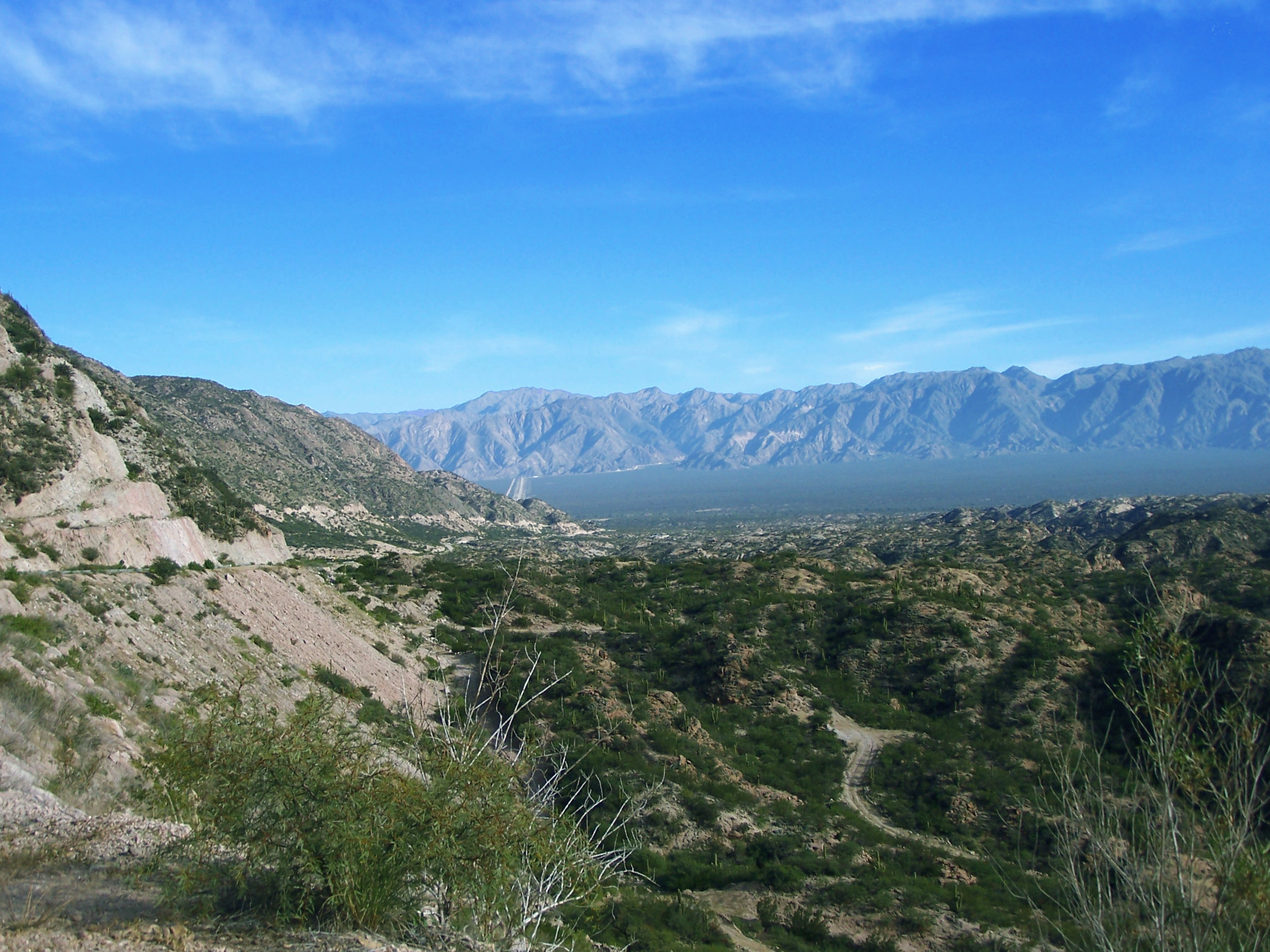 Cuesta de huaco.